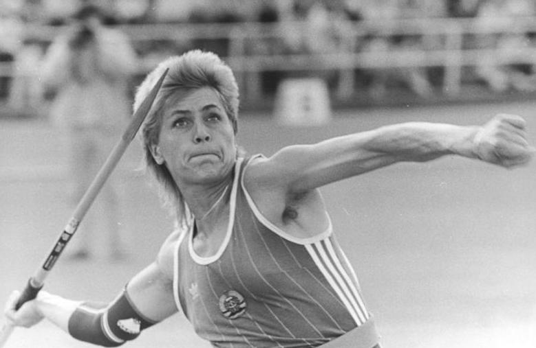 Petra Felke ADN-ZB Oberst 9.9.88 Potsdam: DVfL-Sportfest- Vizeweltmeisterin Petra Felke (SC Motor Jura) verbesserte in Potsdam den Speerwurf-Weltrekord auf 80,00 m und übertraf damit die von ihr selbst gehaltene Bestmarke gleich um 1,10 m.